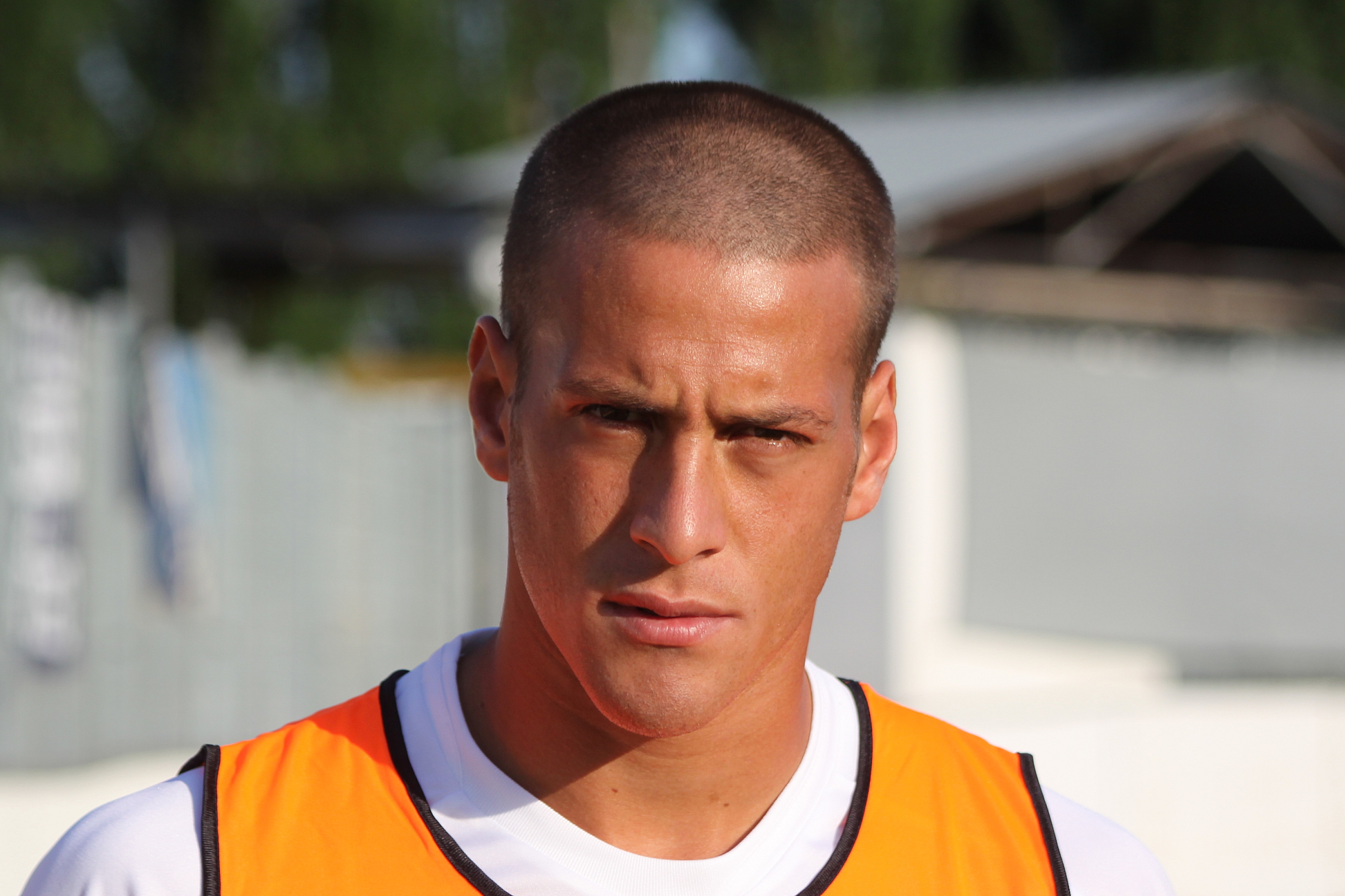 Germán Denis - SSC Neapel (2) Germán Denis - Società Sportiva Calcio Napoli